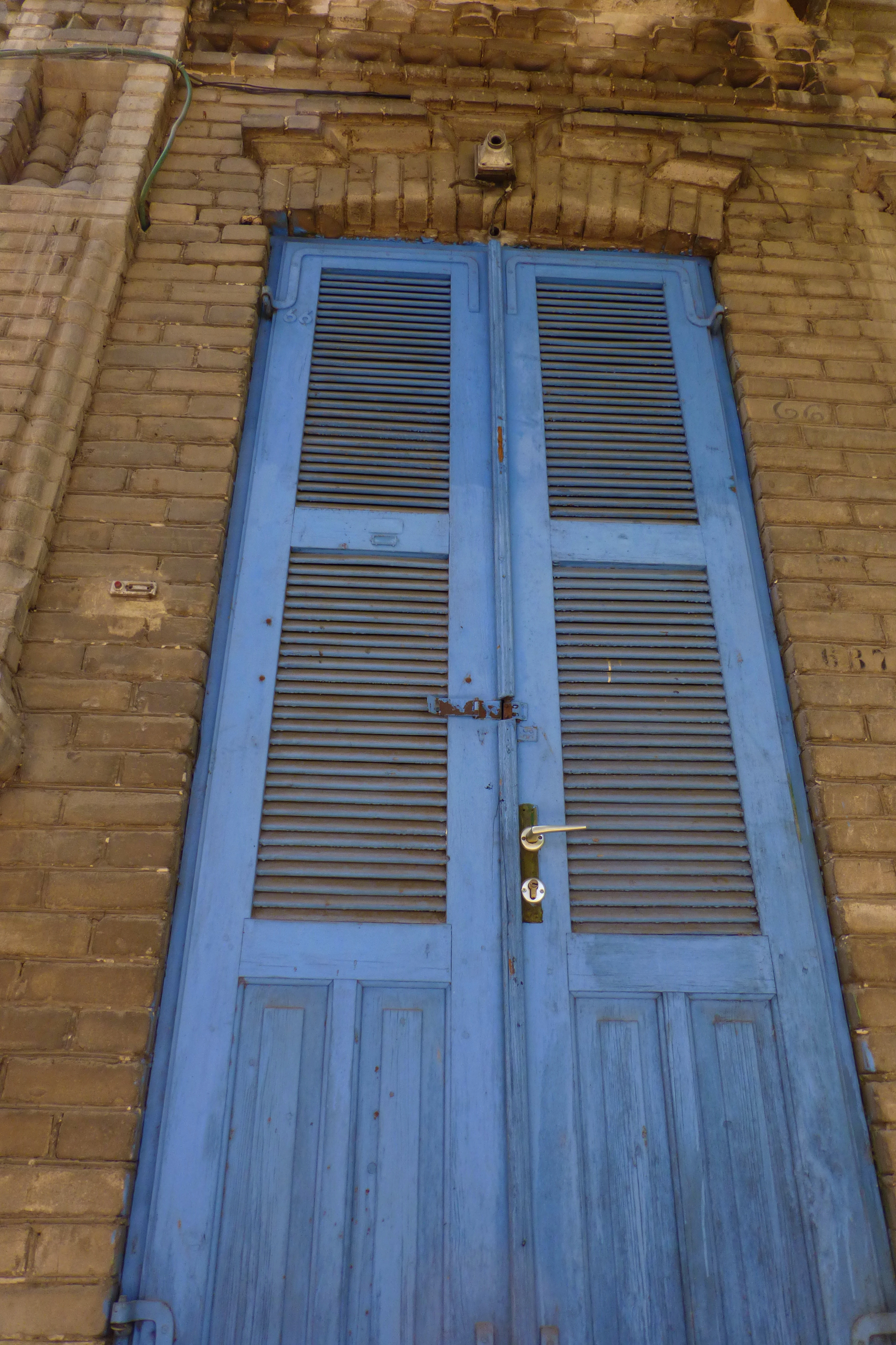 הבית, על חלקה של גודמן, נבנה בדגם בתים דומים בפולין על ידי מרדכי רוטברד ובניו.